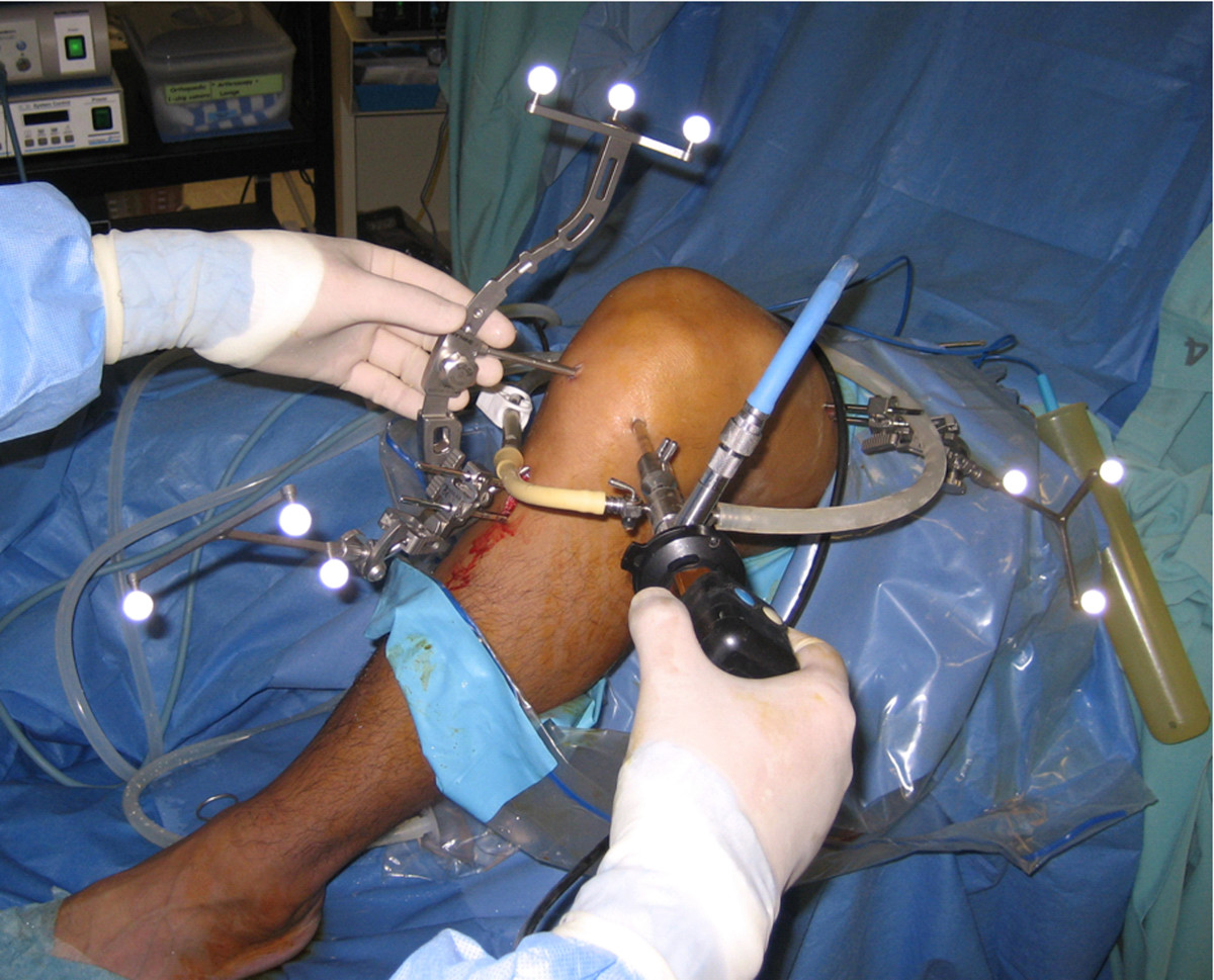 Therapeutische Arthroskopie bei einer Rekonstruktion eines gerissenen vorderen Kreuzbandes